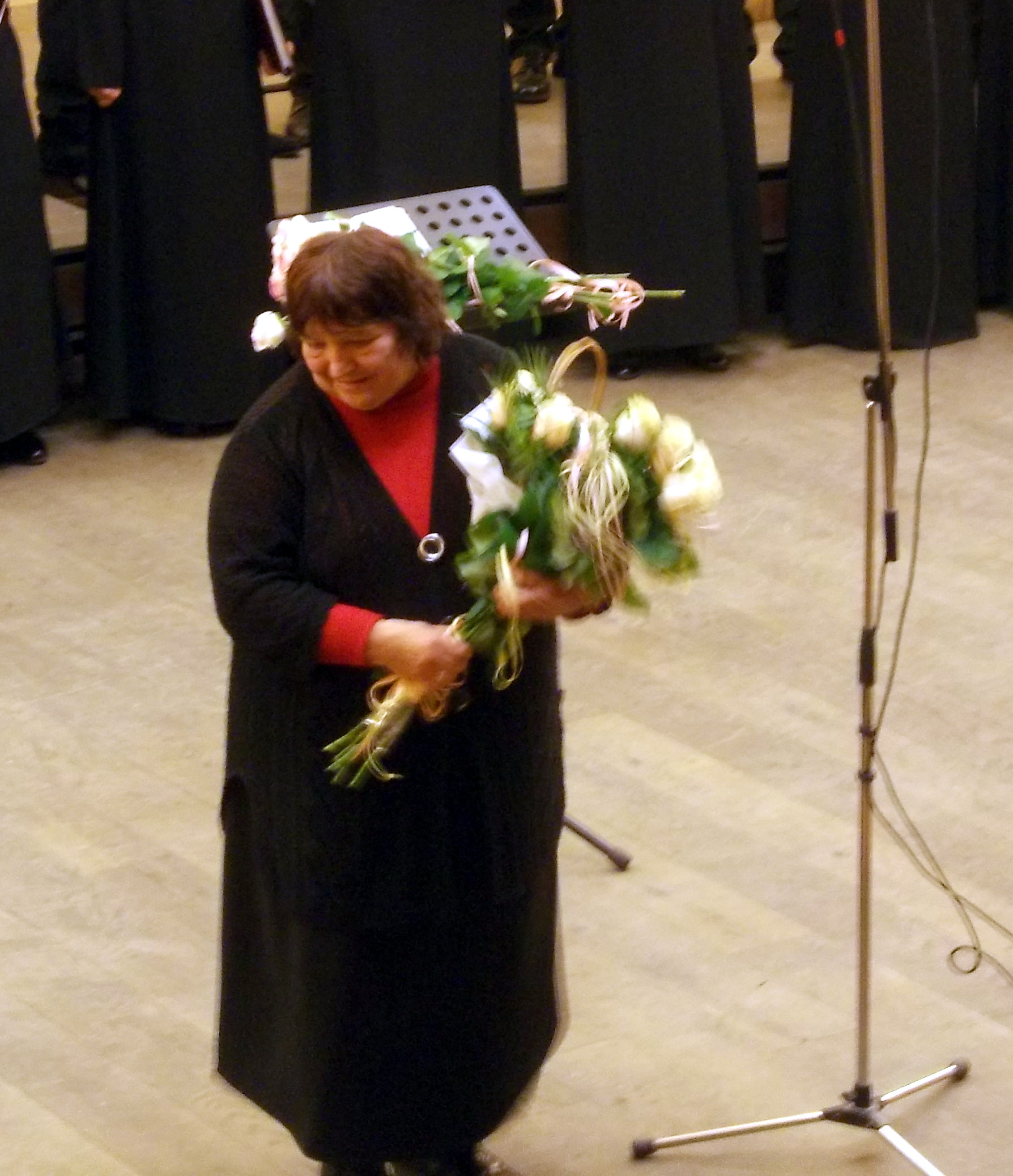 Леся Дичко на авторському концерті у Львові 28 жовтня 2014 р.